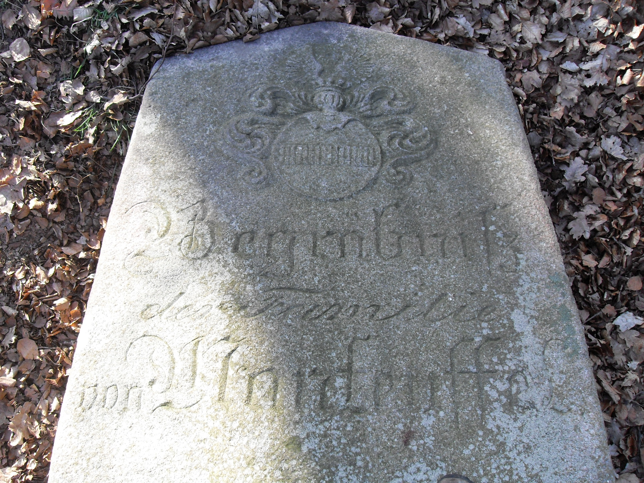 Erbgrab der Familie Manteuffel